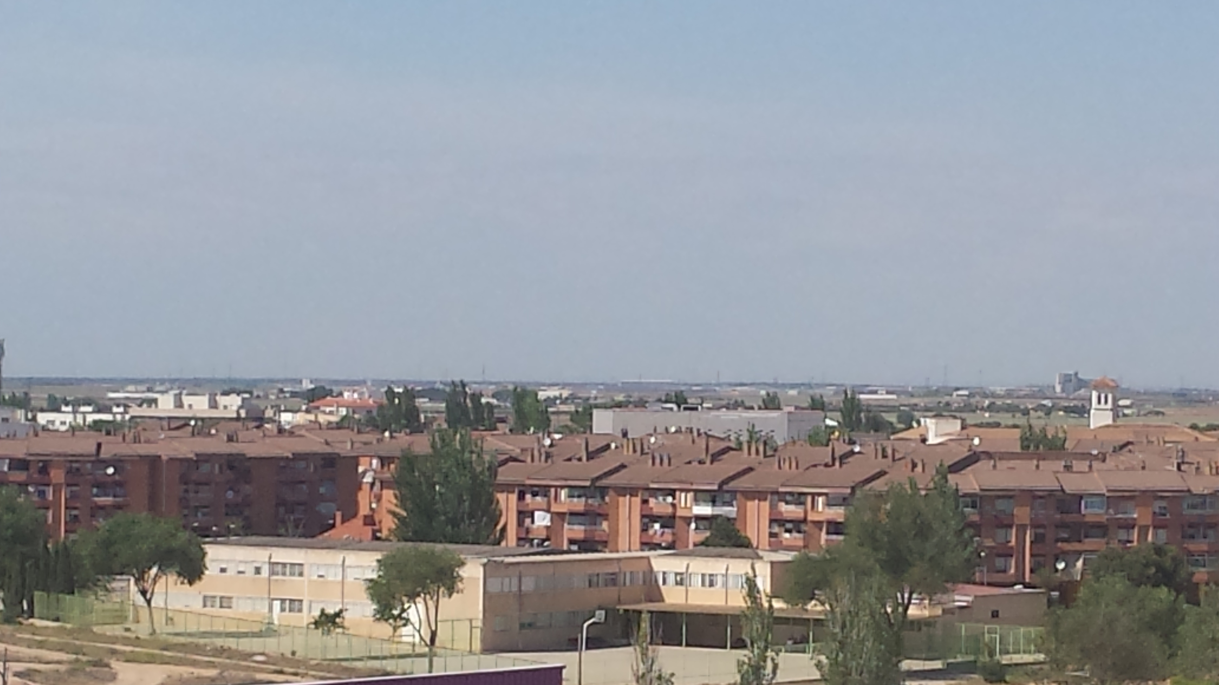 Colegio Público La Paz. Barrio La Milagrosa. Las Seiscientas (Las 600). Albacete